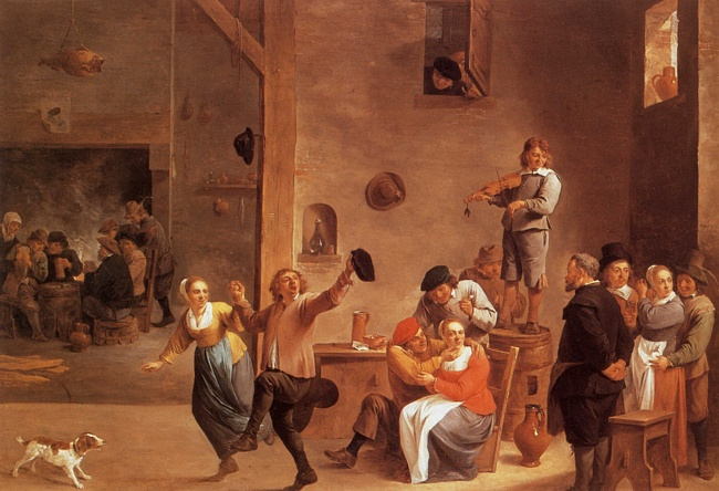 "Таверна с парой танцоров" Холст, масло. Мюнхен, Германия. Баварская государственная картинная галерея